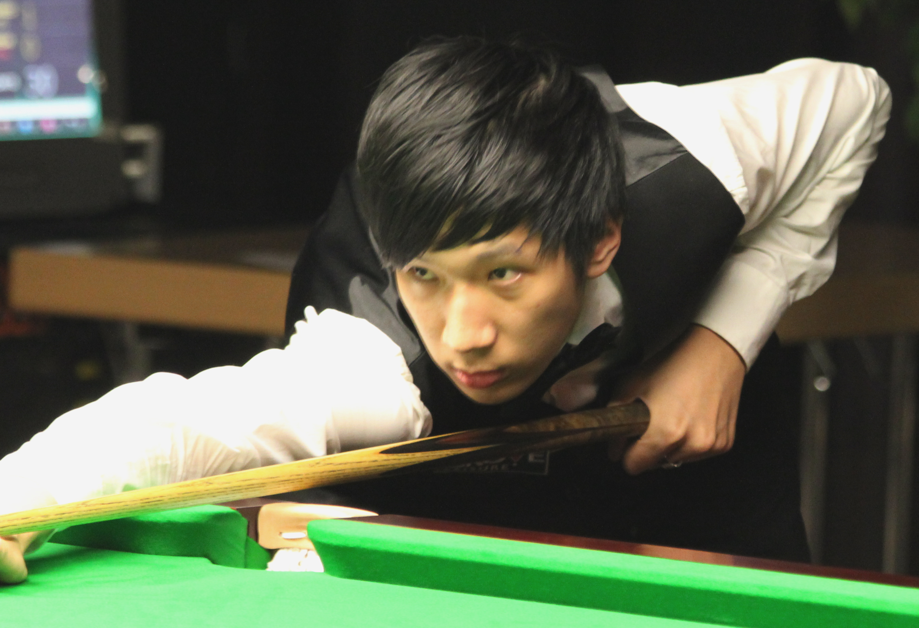 Li Yan beim Paul Hunter Classic 2012